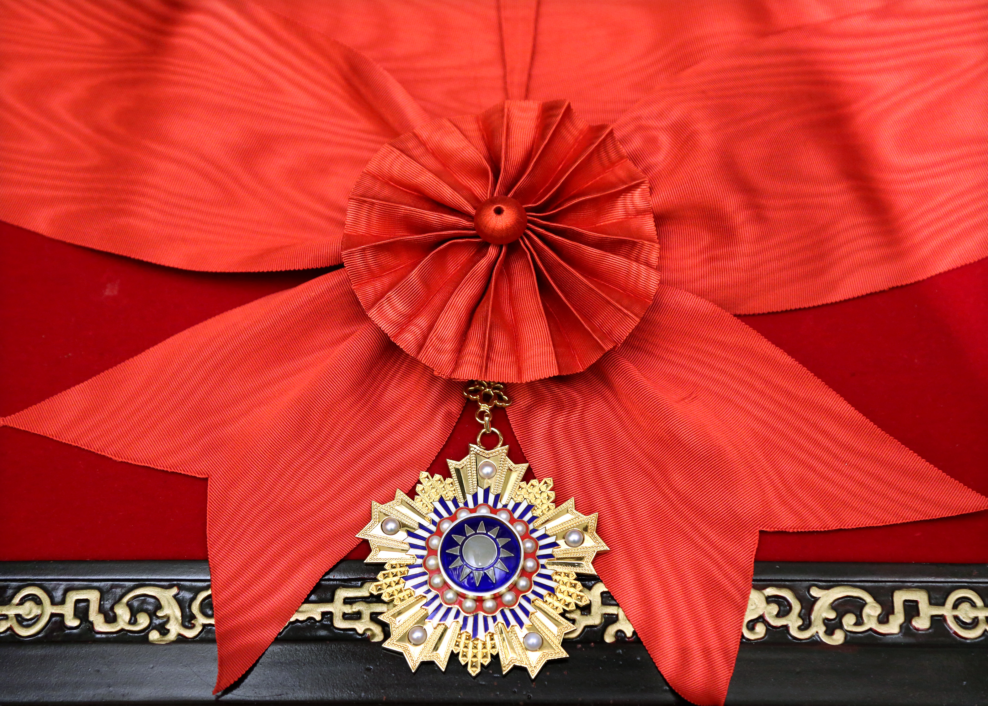 中文（台灣）: 中華民國總統馬英九頒給馬爾他騎士團大教長馬修·費斯汀的采玉大勳章。